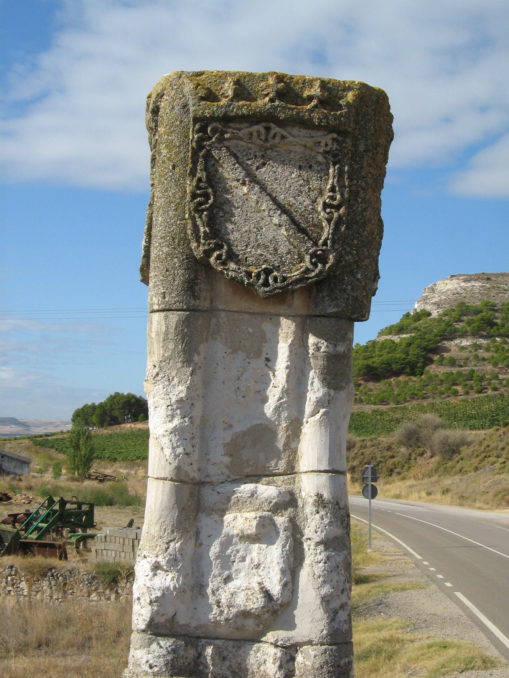 Curiel de Duero. Rollo de Justicia. Escudo de los Zúñiga. Valle del Cuco. Valladolid